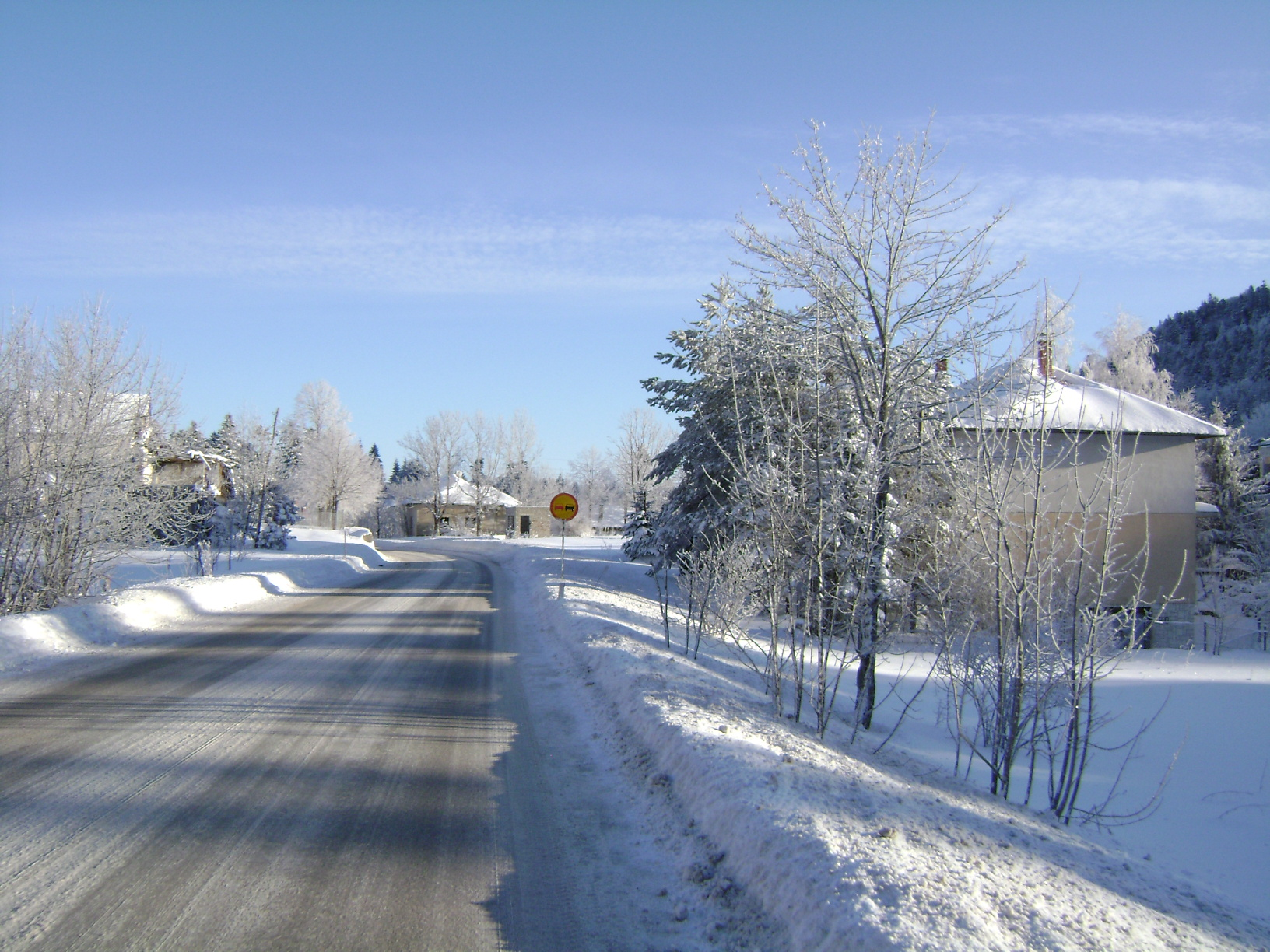 Ostrelj